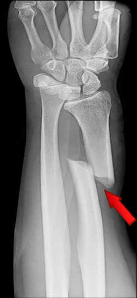 Radiografia anteroposterior del antebrazo en la que se observa una fractura de radio (fractura de Galeazzi).